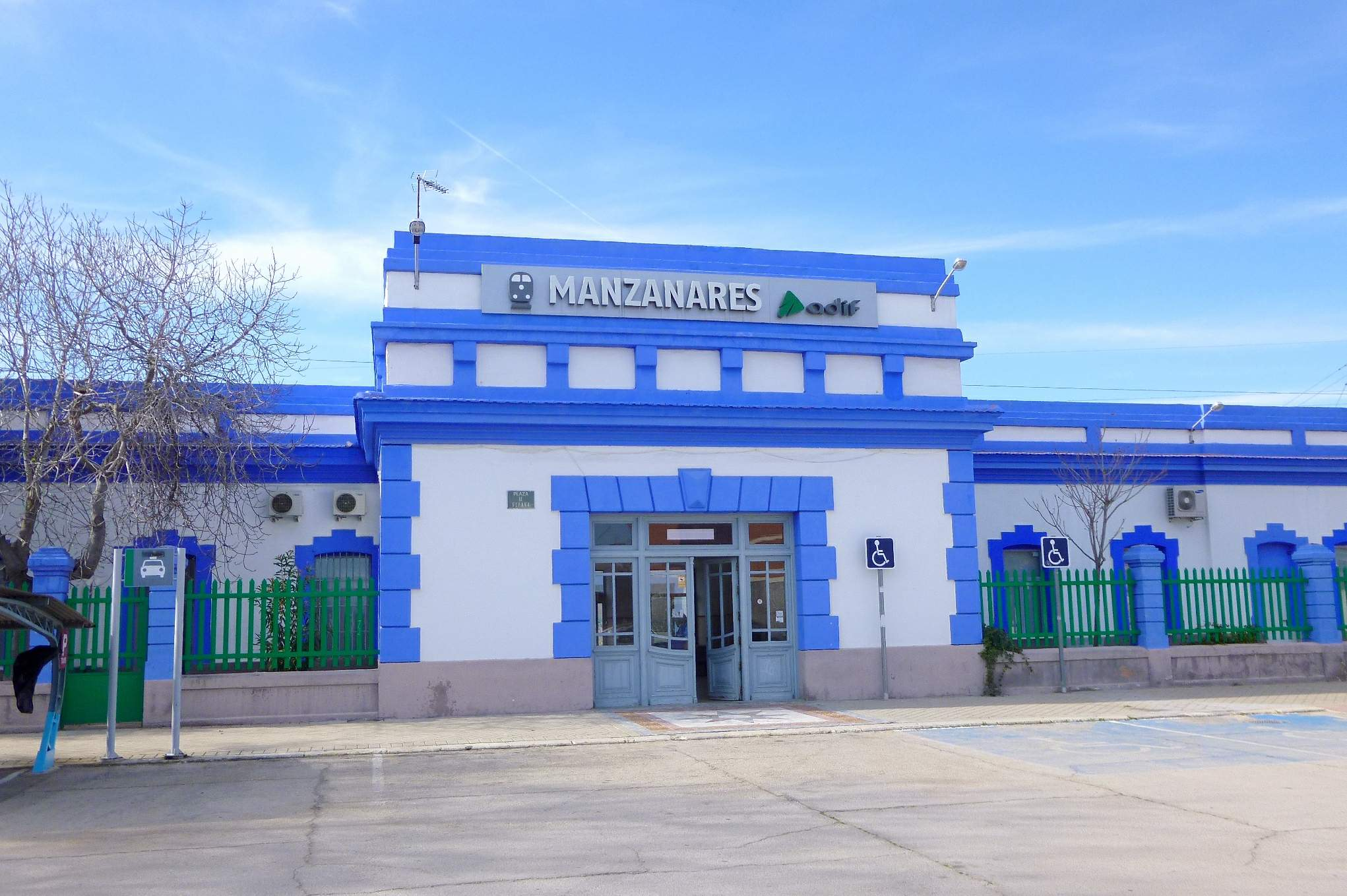 Estación de Adif de Manzanares (Ciudad Real)